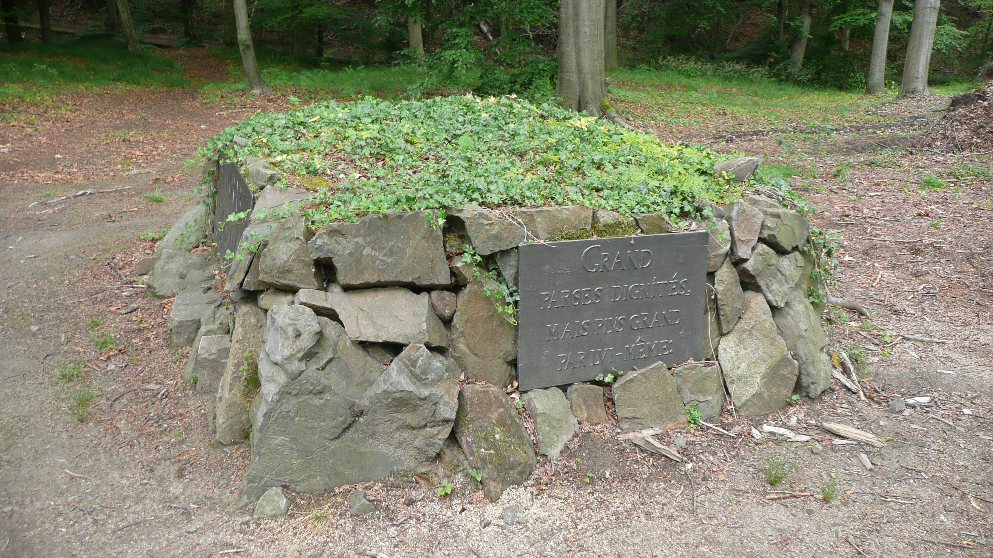 Denkmal Minister von Brühl im Seifersdorfer Tal in Sachsen